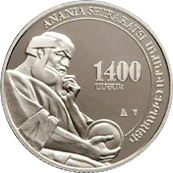 Памятная монета Армении 2005 года "Анания Ширакаци" - 100 драм - серебро 925